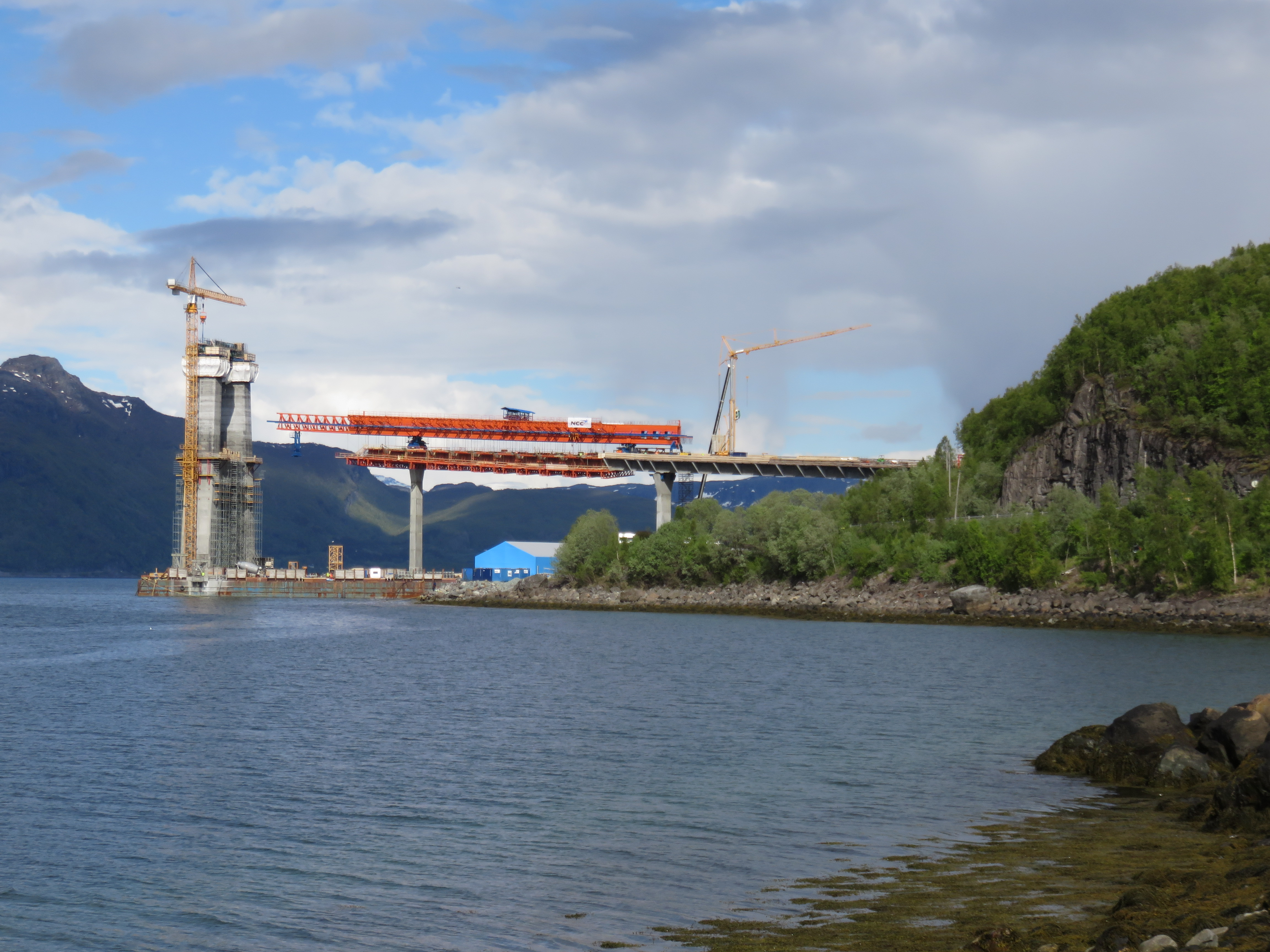 Hålogalandsbrua, Narvik 17. juni 2015. Konstruksjon av brua sett fra Narviksiden.